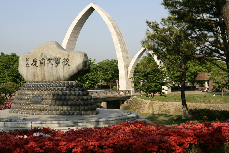 경상대학교 정문과 교명탑